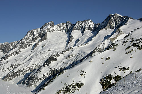 Ausblick vom Eggishorn zum Gr. Wannenhorn